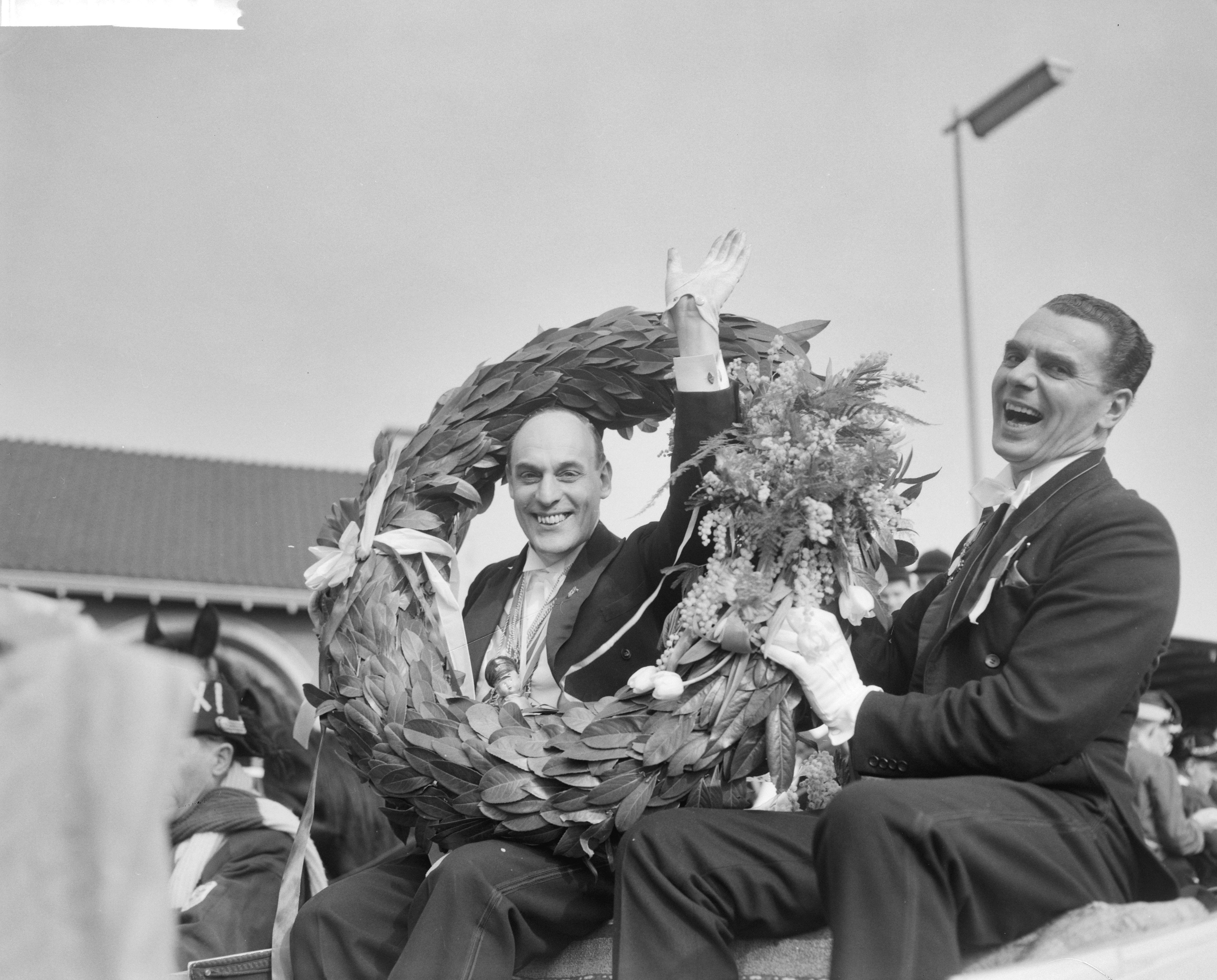 Collectie / Archief : Fotocollectie Anefo Reportage / Serie : [ onbekend ] Beschrijving : Carnaval in Den Bosch , Prins Amadeus XVIII Datum : 3 maart 1962 Locatie : Den Bosch Trefwoorden : CARNAVAL Persoonsnaam : Prins Amadeus Xviii Fotograaf : Bilsen, Joop van / Anefo Auteursrechthebbende : Nationaal Archief Materiaalsoort : Negatief (zwart/wit) Nummer archiefinventaris : bekijk toegang 2.24.01.04 Bestanddeelnummer : 913-5874